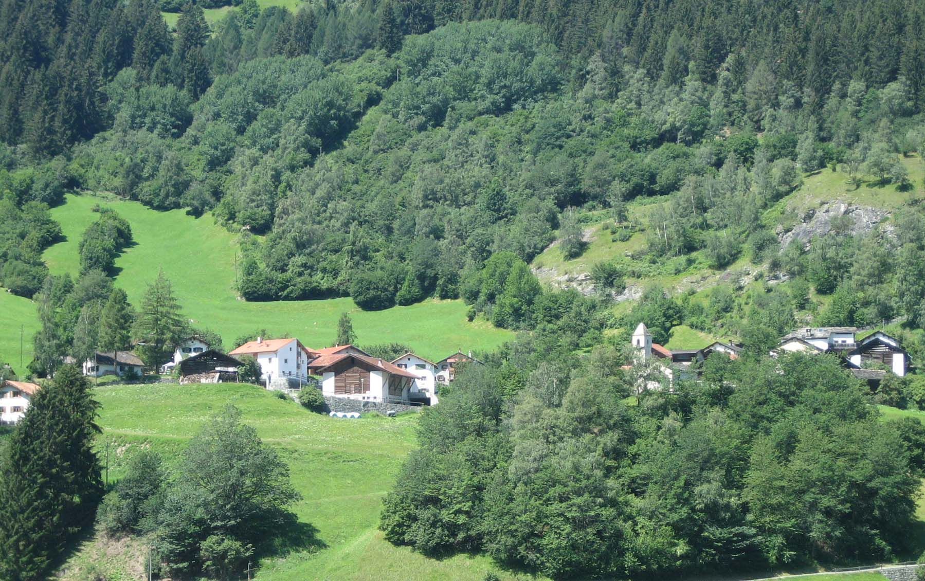 Clugin